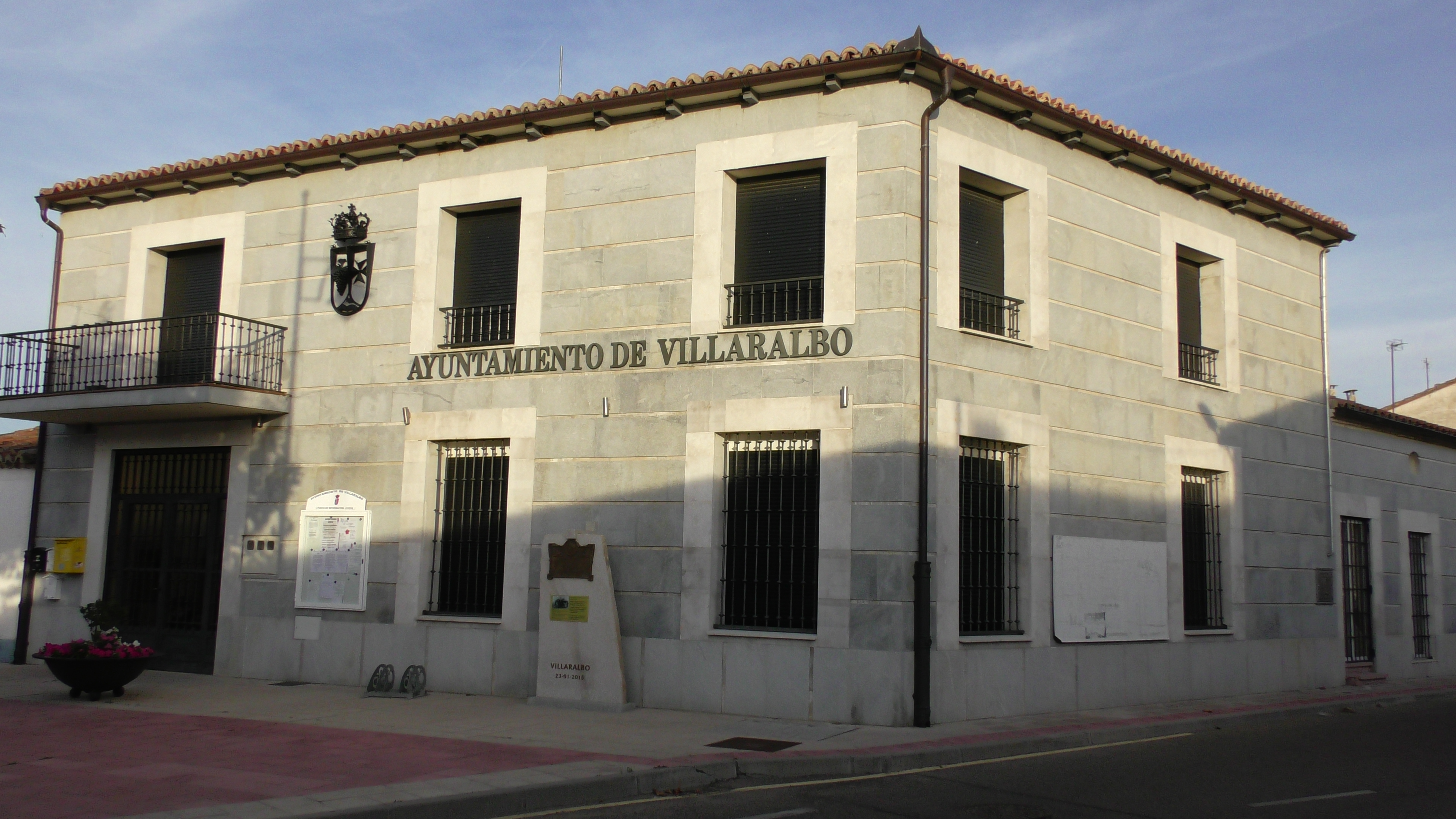 Villaralbo